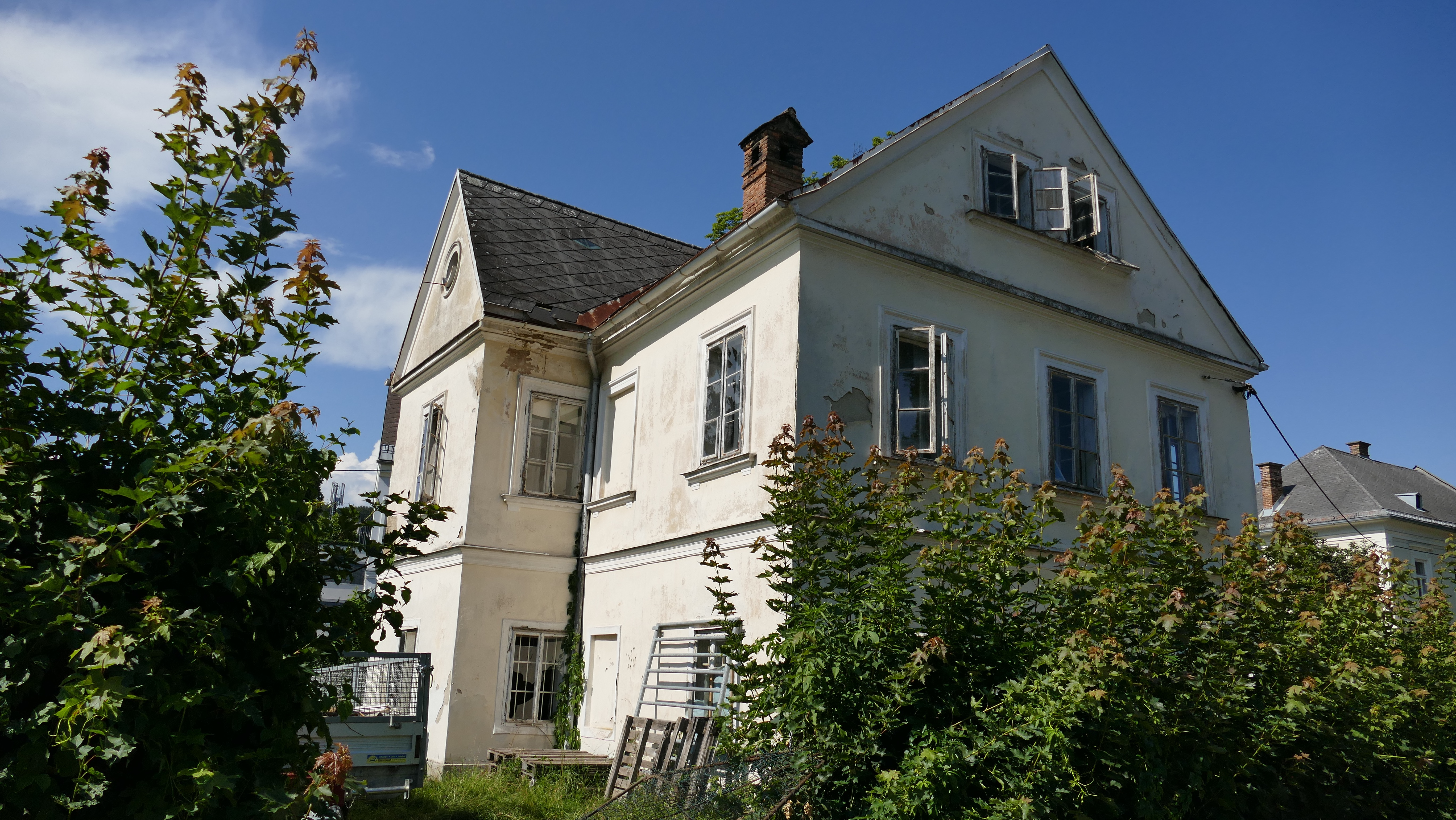 Klagenfurter Haus von Maria Lassnig in der Tschabuschniggstraße 9, 2018 leerstehend und heruntergekommen.